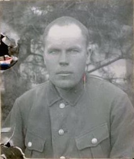 Олексюк Н. З.